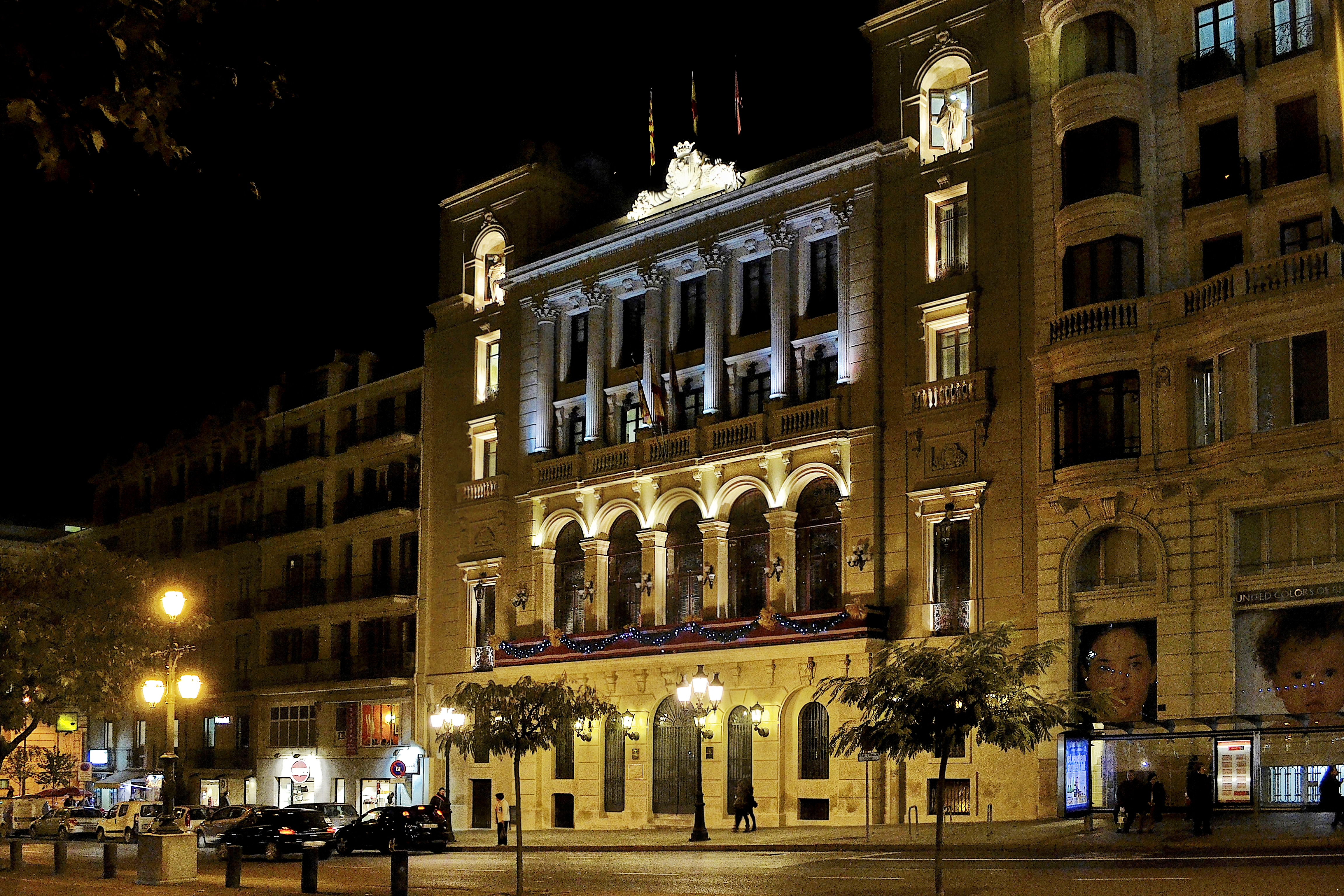 Fachada avenida Blondel de la Paeria de Lleida.